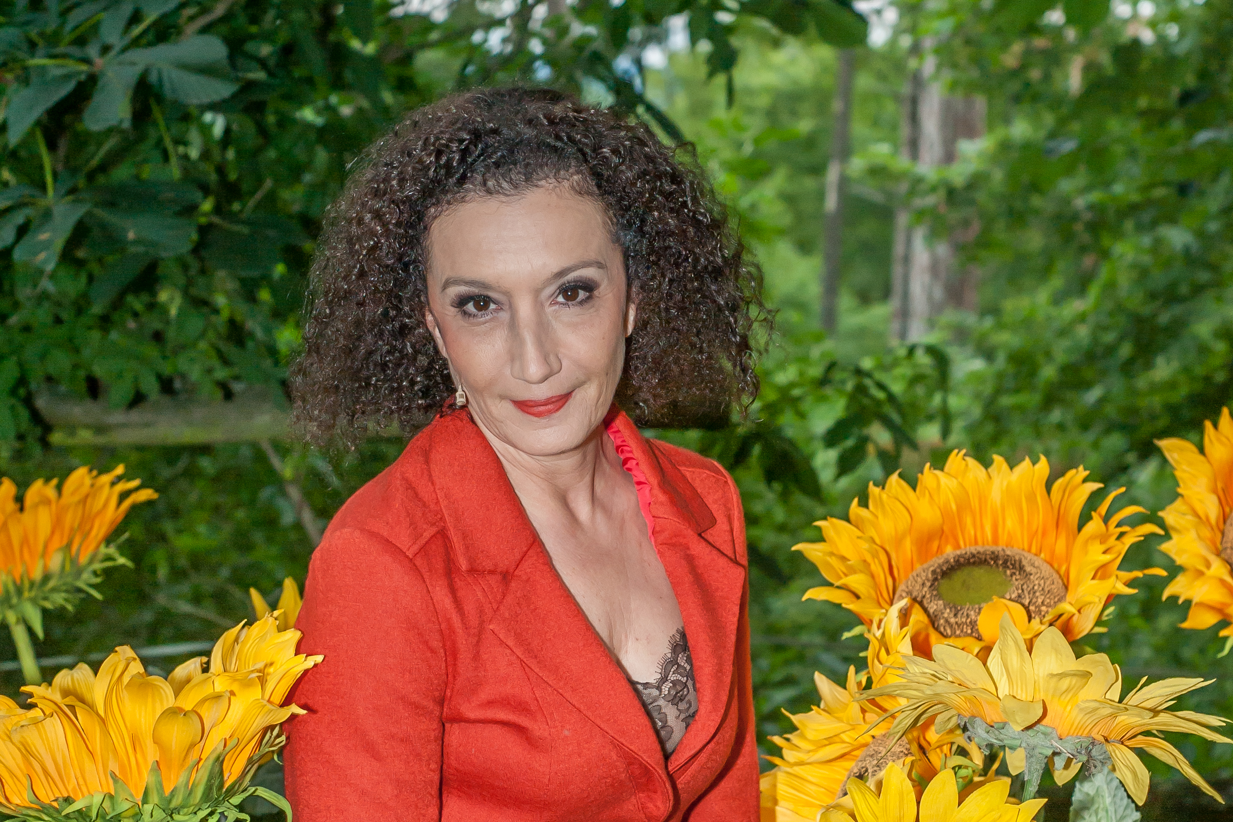 Sommernachtskomödie Rosenburg 2016, Premiere von Kalender Girls am 30. Juni 2016. Bild zeigt Konstanze Breitebner.